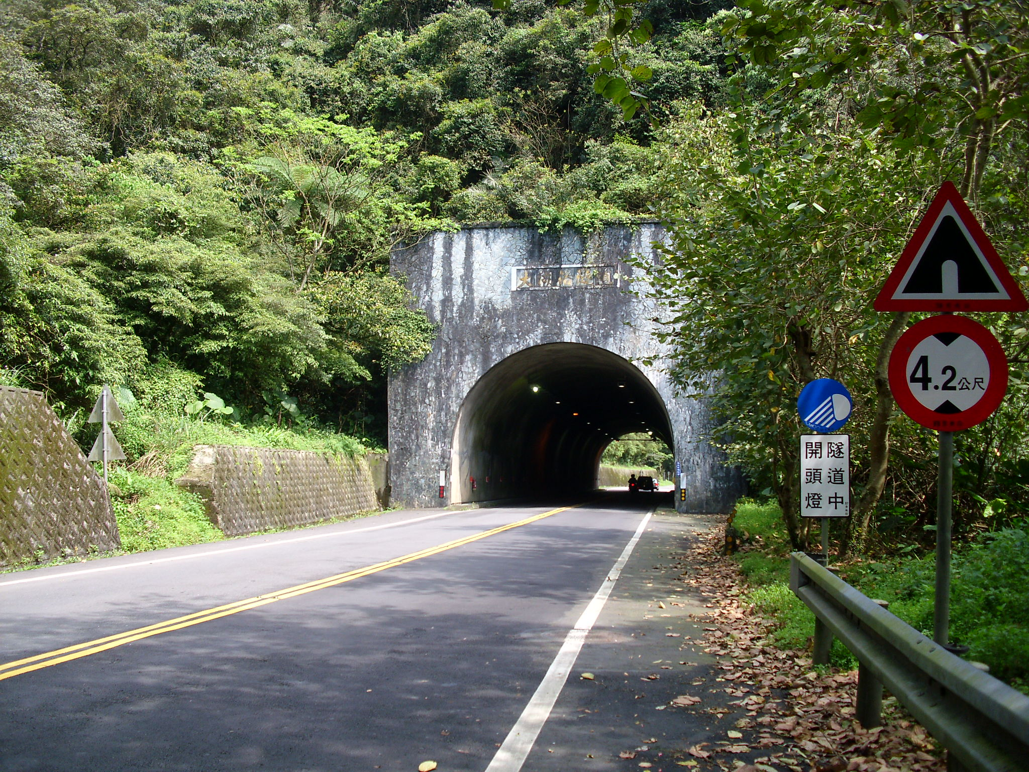 中文（台灣）: 縣道106線的大湖格隧道，位於新北市石碇區。